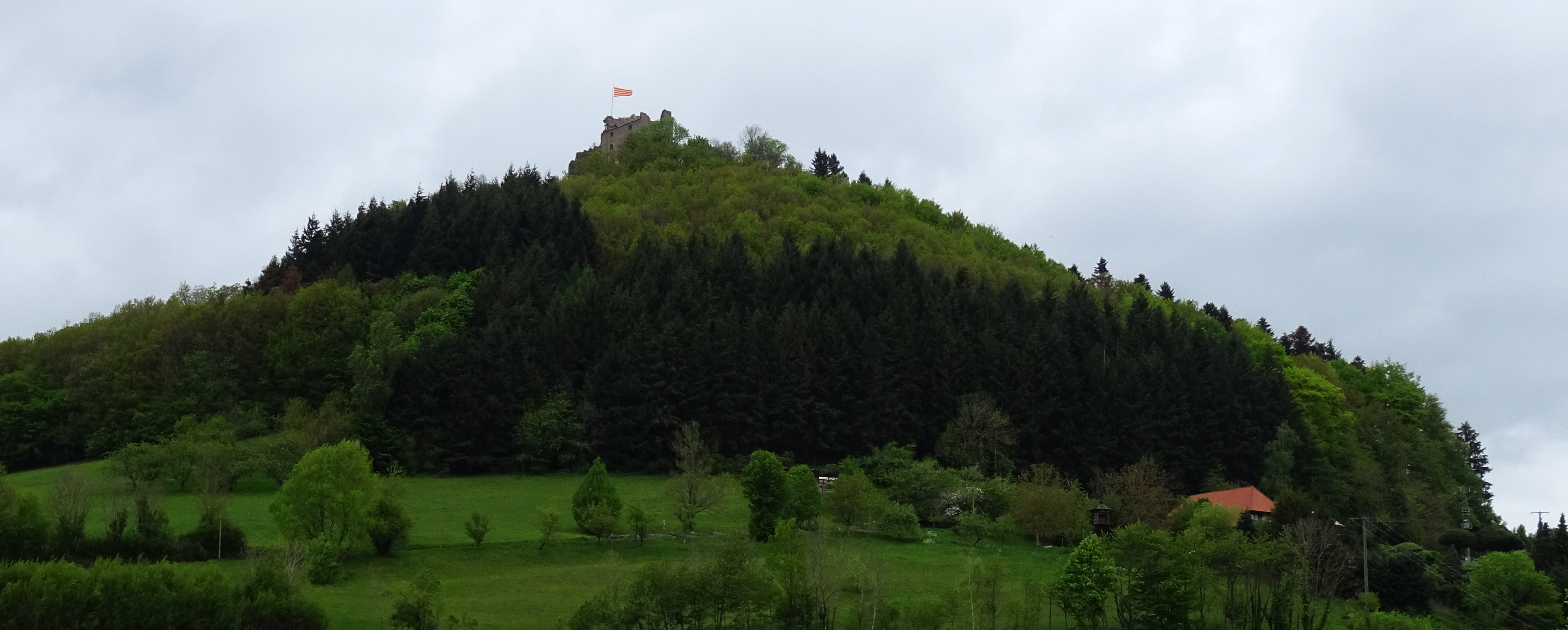 Burgruine Hohengeroldseck von Schönberg aus gesehen